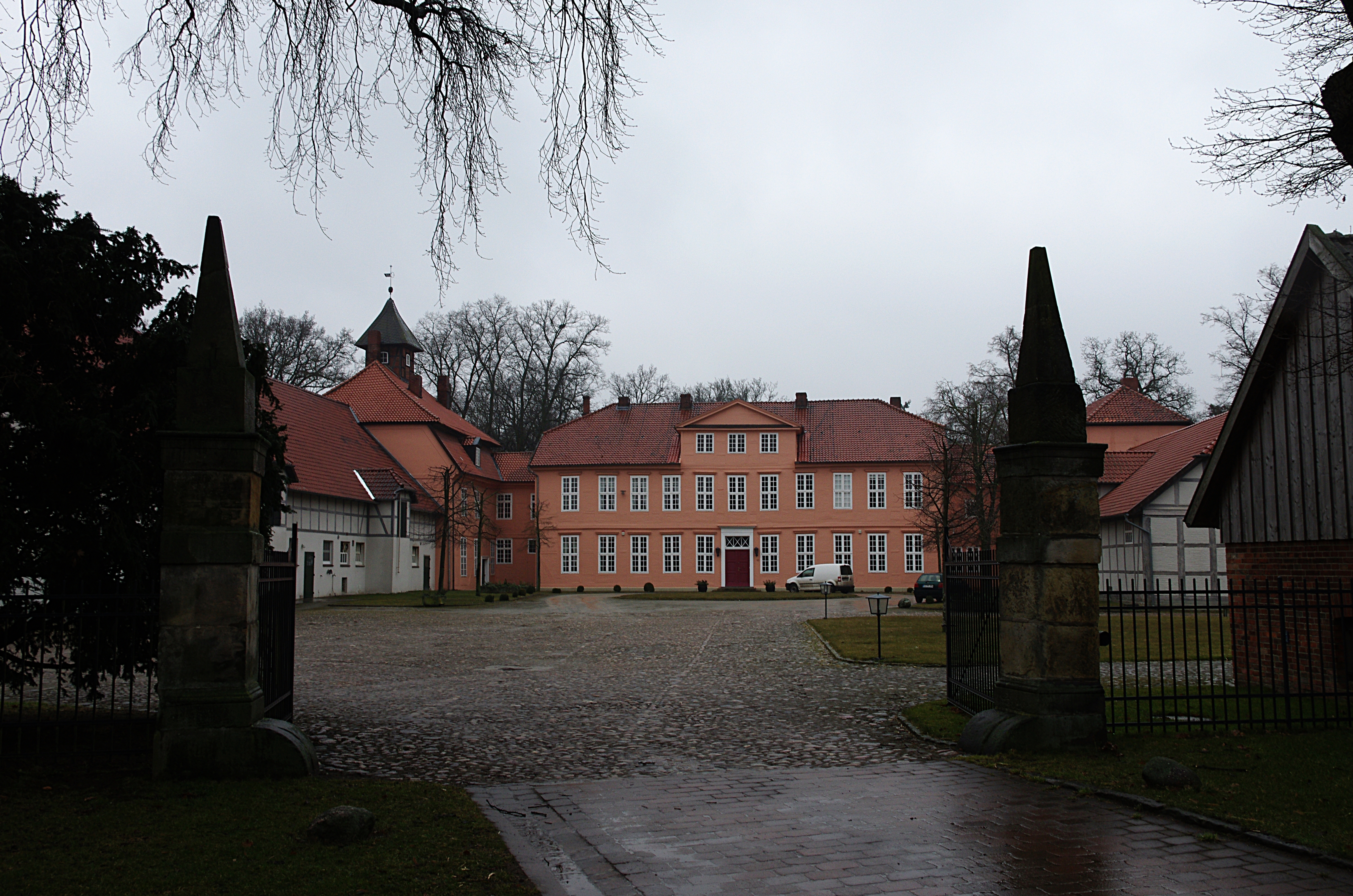 Langlingen im Landkreis Celle. Das Gutshaus steht unter Denkmalschutz.